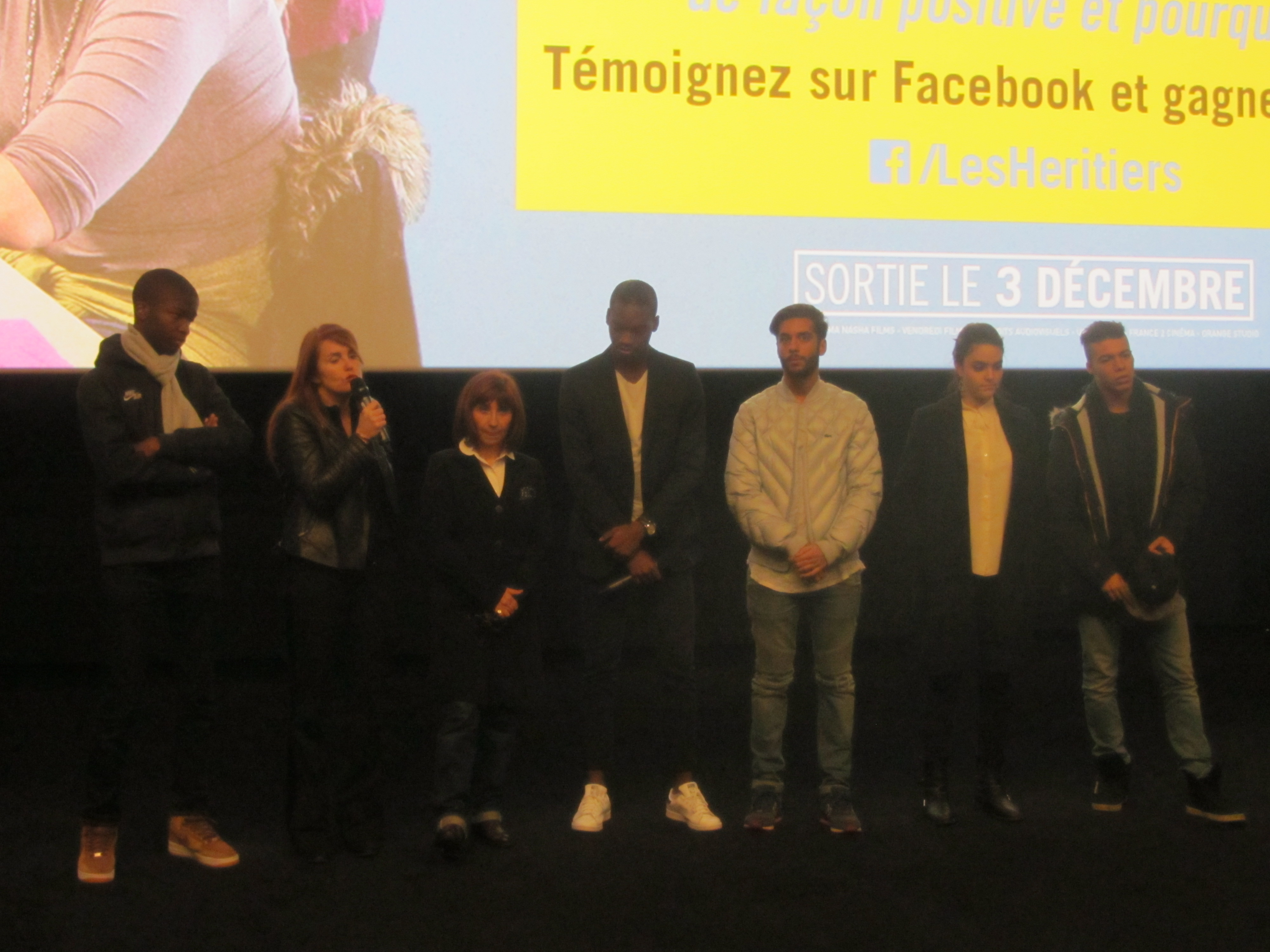 Avant-première du film Les Héritiers au cinéma UGC Paris 19, Paris